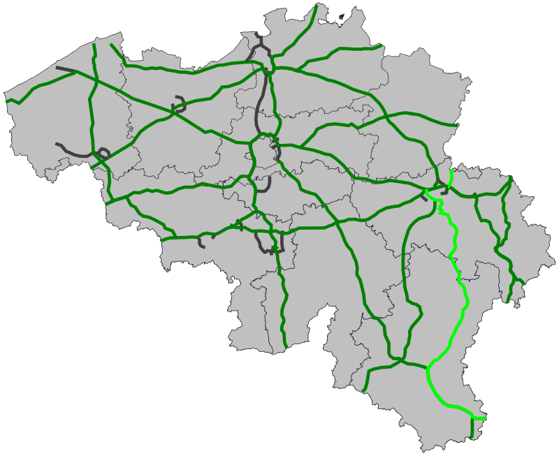 Traject Europese weg 25 in België